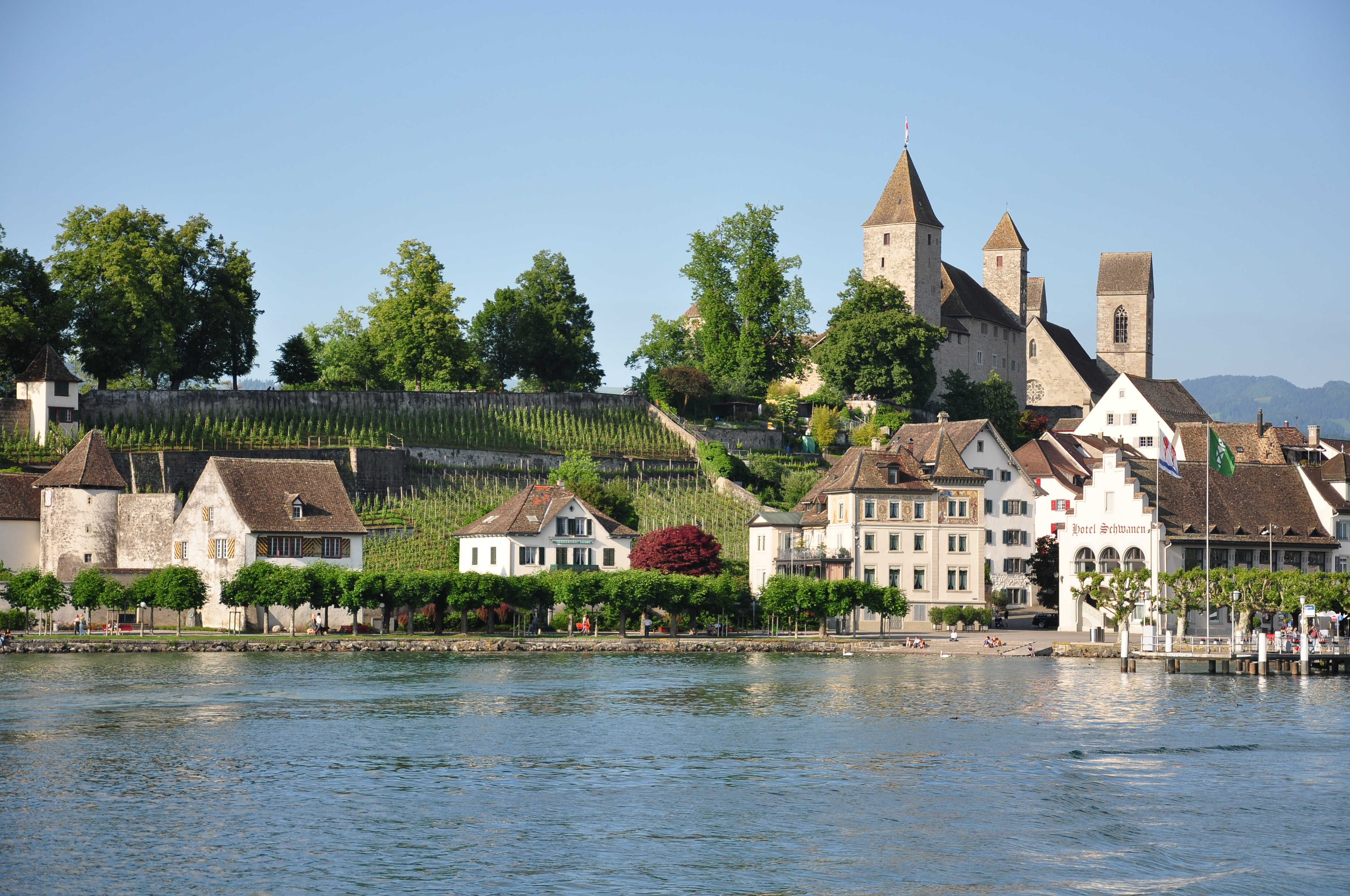 Rapperswil harbour, Lindenhof and Altstadt, as seen from ZSG paddle steamer Stadt Zürich, Schloss Rapperswil and Stadtpfarrkirche in the background.